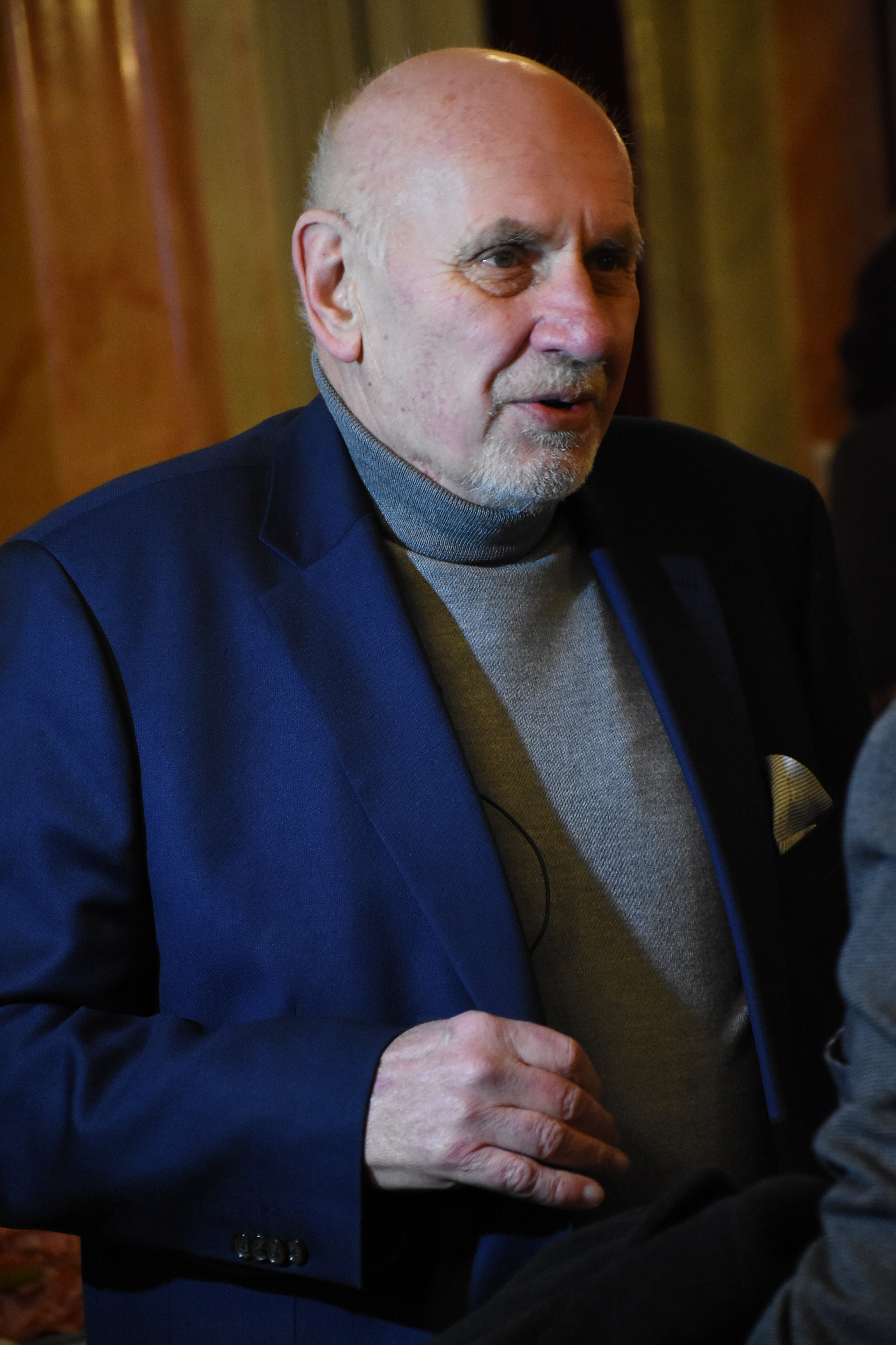 Setkání signatářů k 40. výročí Charty 77, Palác Lucerna, Praha, 7. ledna 2017Pavel Rychetský